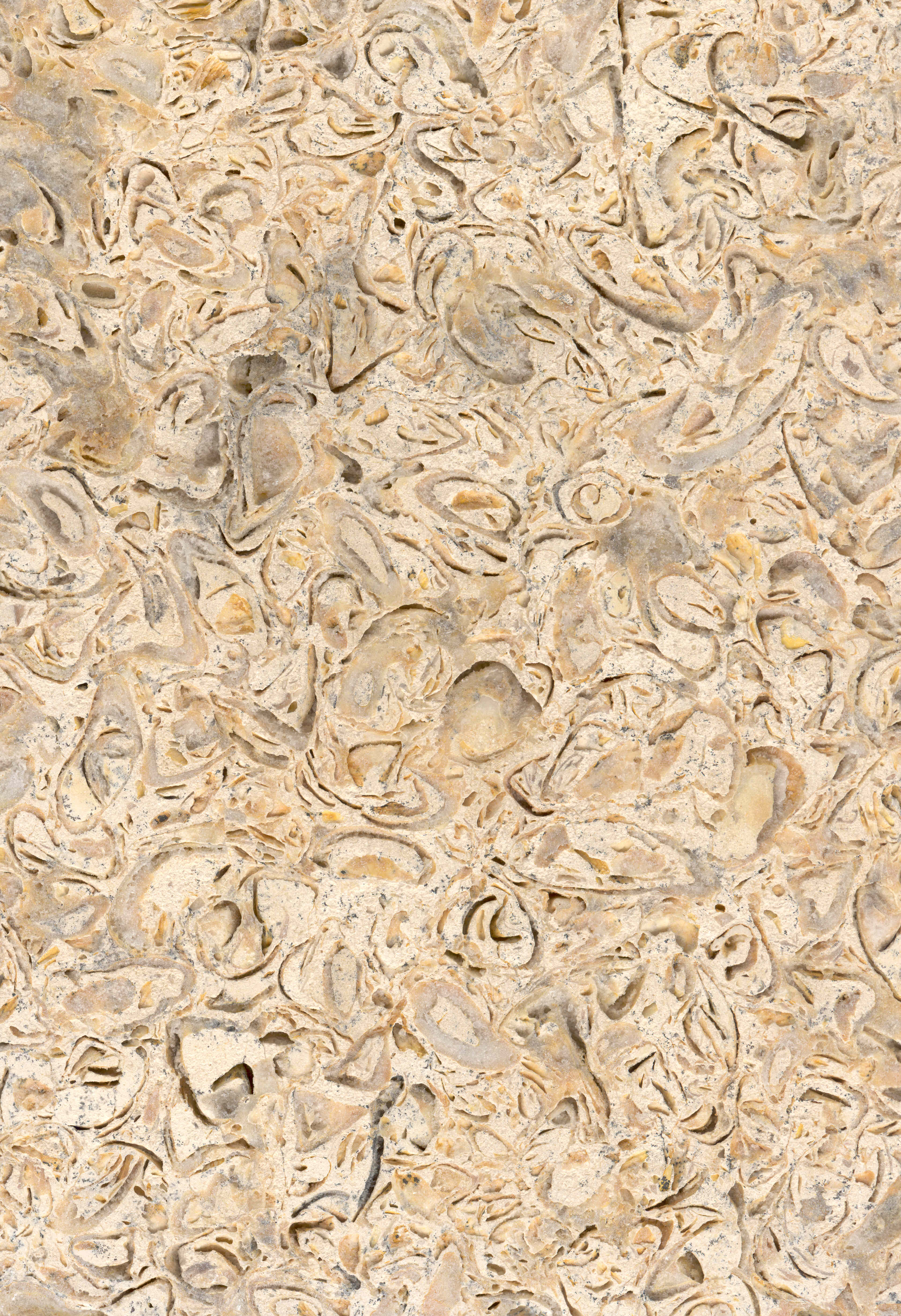 Schillkalk